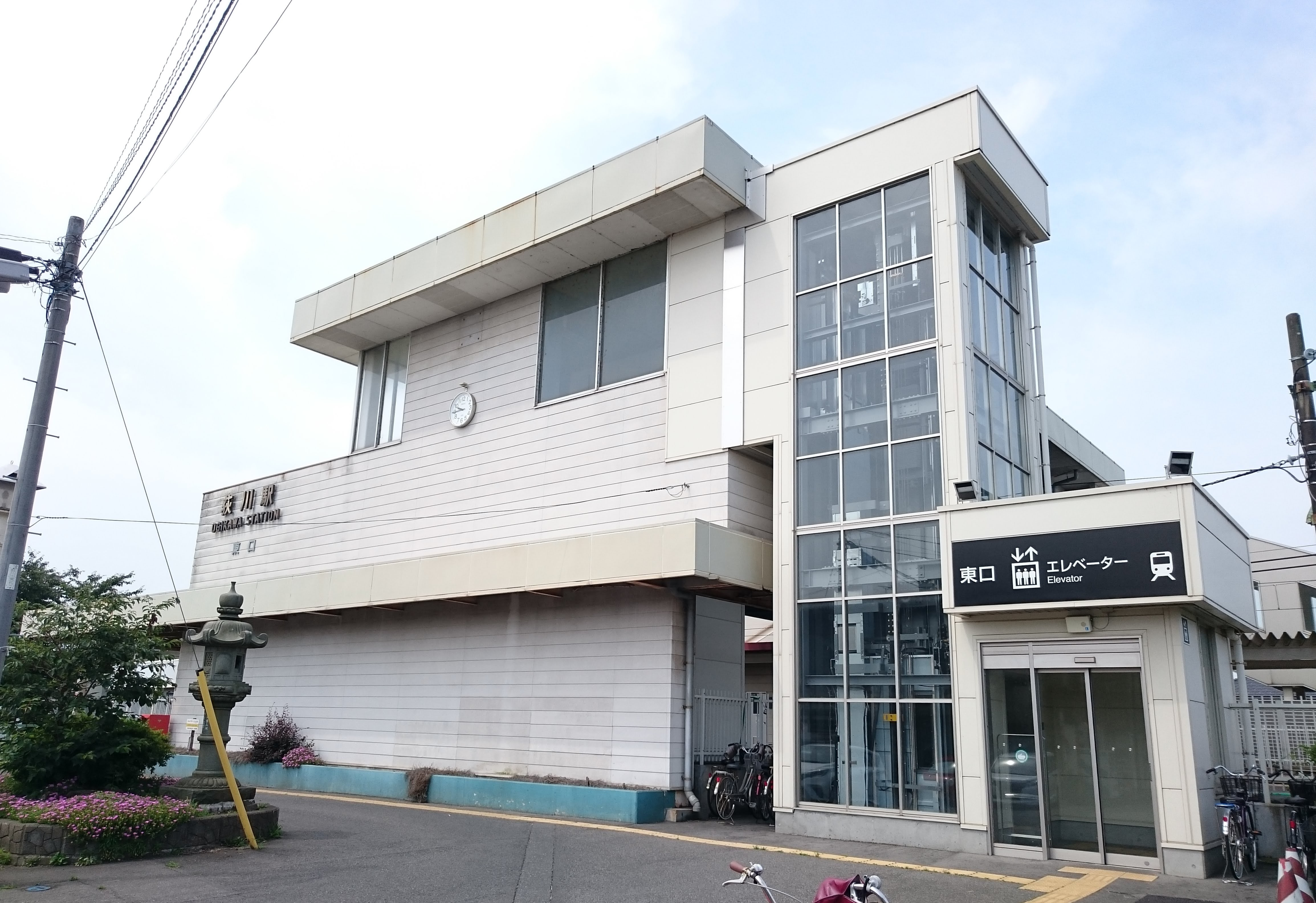 荻川駅の東口駅舎